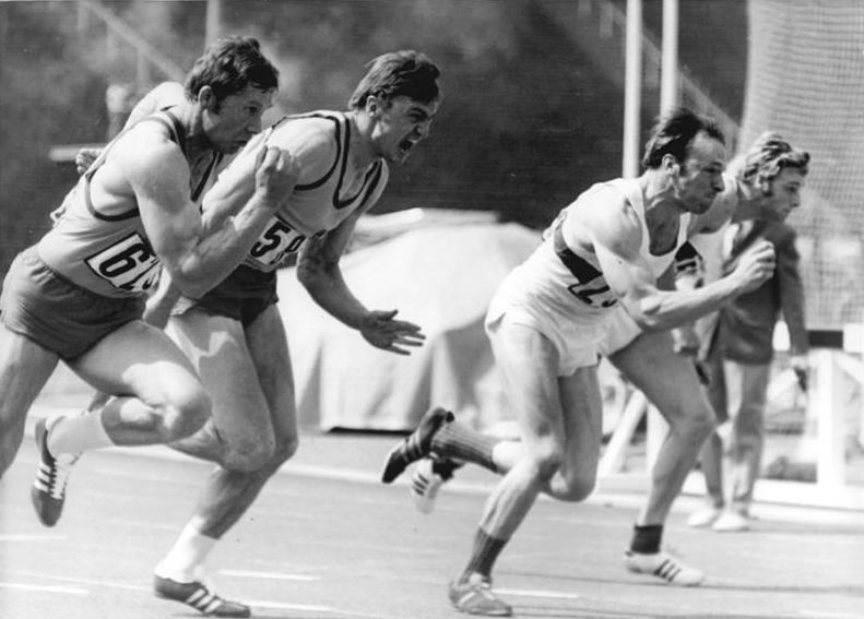 ADN-ZB Kluge 25.6.71 Leipzig: XXII. DDR-Meisterschaften der Leichtathletik (1.Tag)- Start der Zehnkämpfer zur ersten Disziplin. Im 3. Lauf über 100 m vlnr: Herbert Wessel, Joachim Kirst (beide ASK Vowärts Potsdam), Rüdiger Demmig (SC Motor Jena- nach diesem Lauf wegen Verletzung ausgeschieden) und Hans-Dieter Michalak (SC Magdeburg).